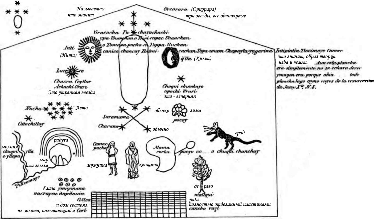 Косомлогия инков